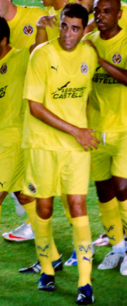 El Vila-real celebrant un gol, en un amistós en pretemporada davant el Nàstic.